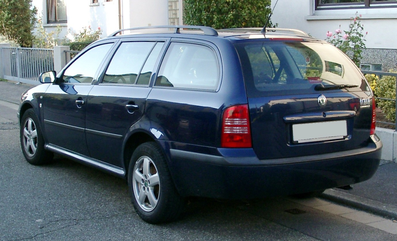 Škoda Octavia Kombi, 1. Generation